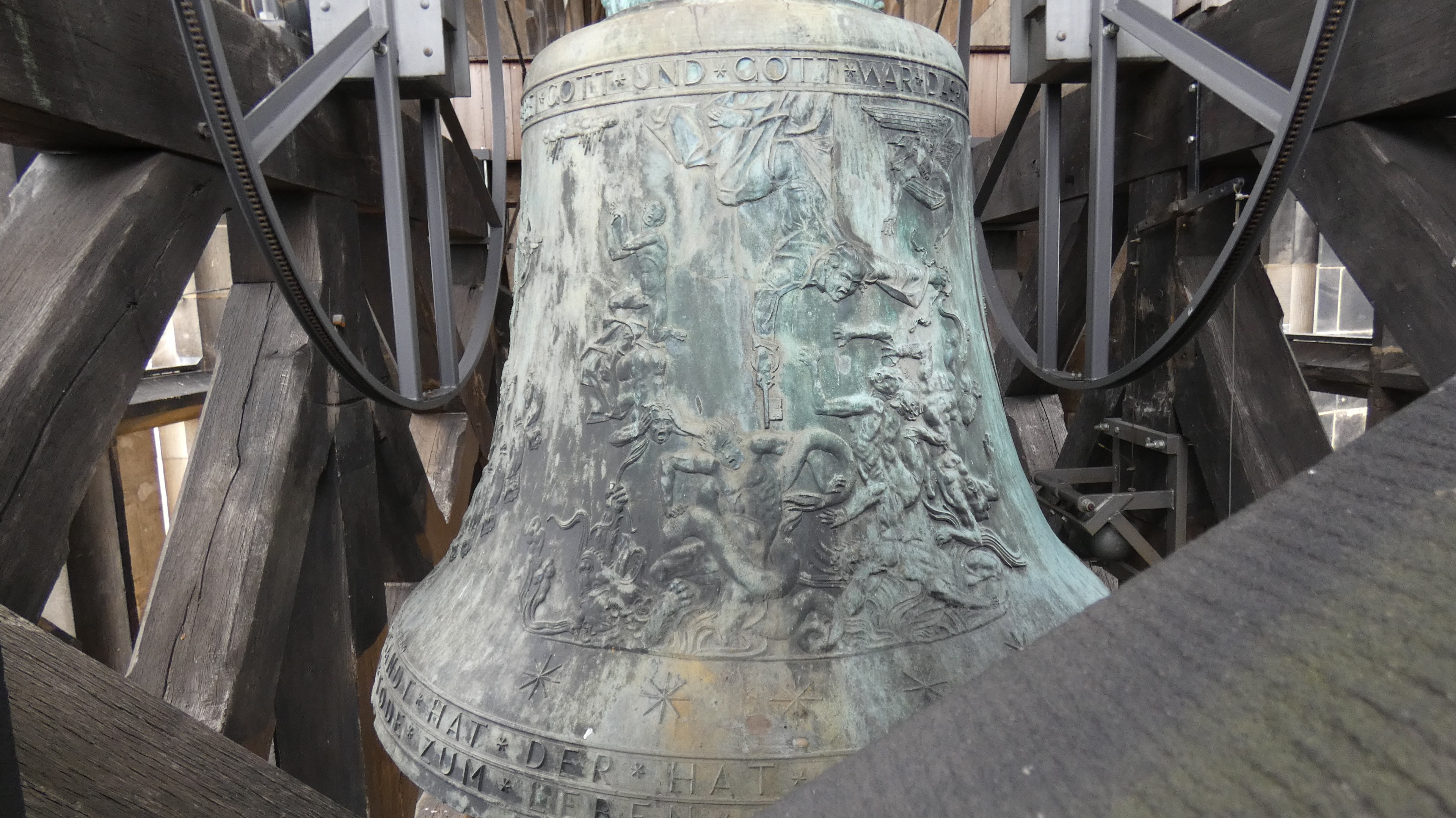 Die größte Glocke im Dom zu Meißen.